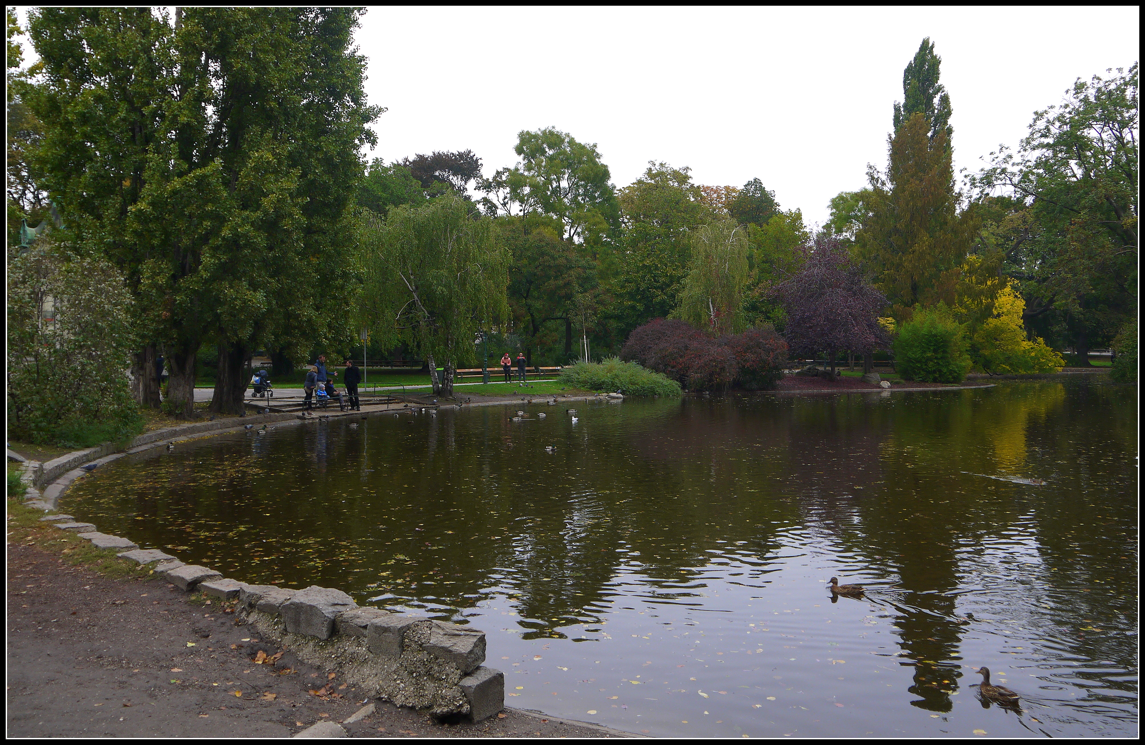 Stadtpark